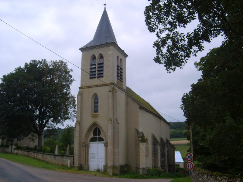 La Paroisse de Chazeuil